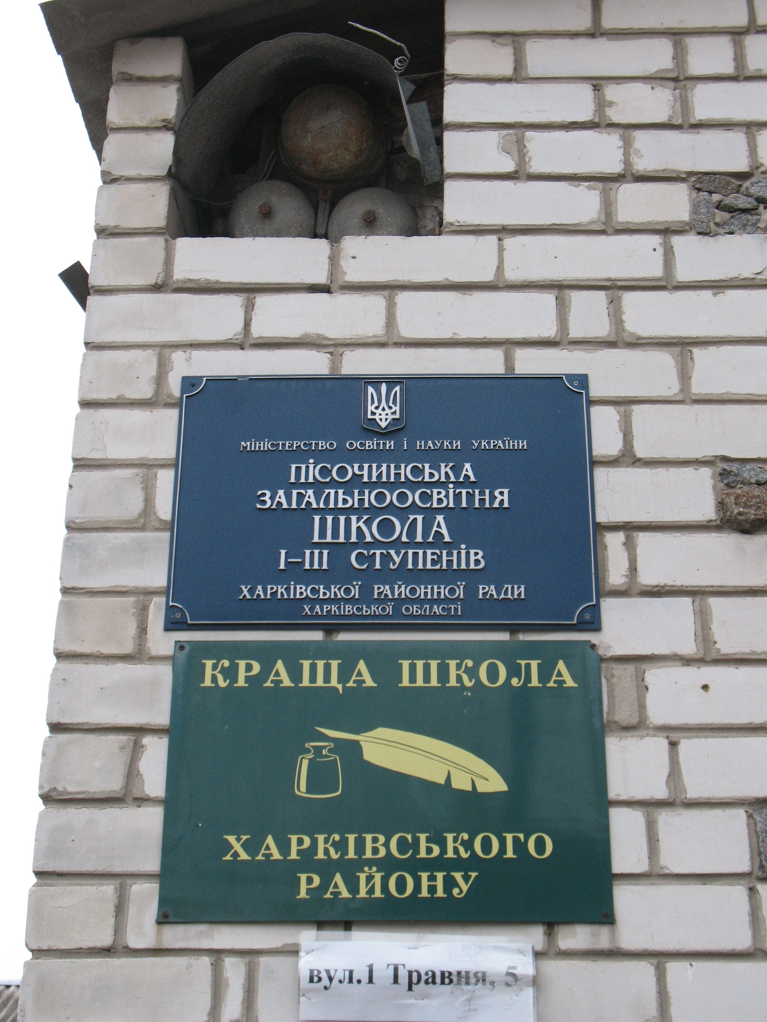 Песочинская начальная школа (ул. 1 Мая, 5) - лучшая школа Харьковского района. Вывески. Также вверху виден звонок школы.